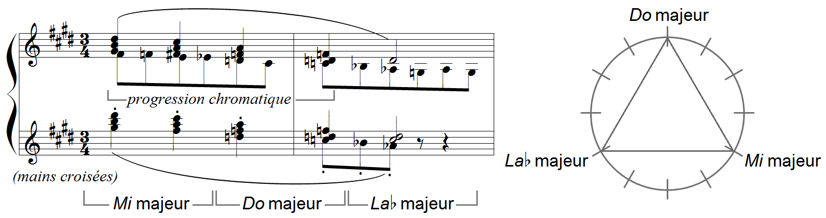 Debussy - Etude X, analyse mes.19-20